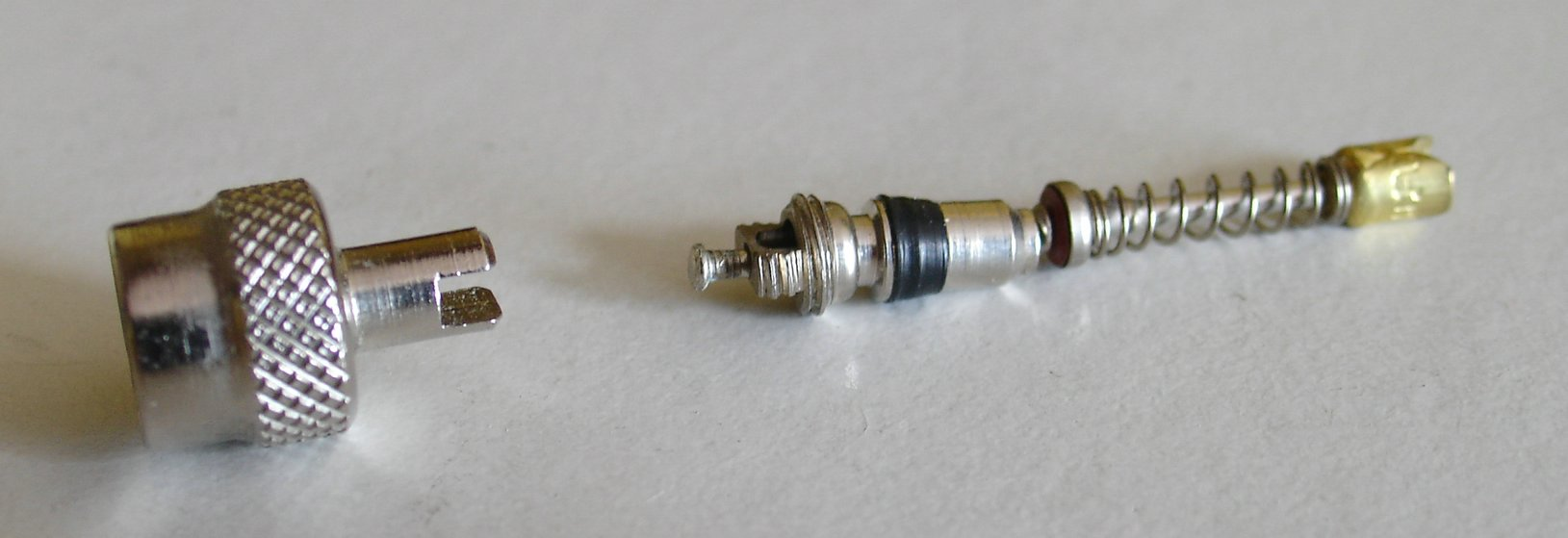 Kaperka i wentyl (1)